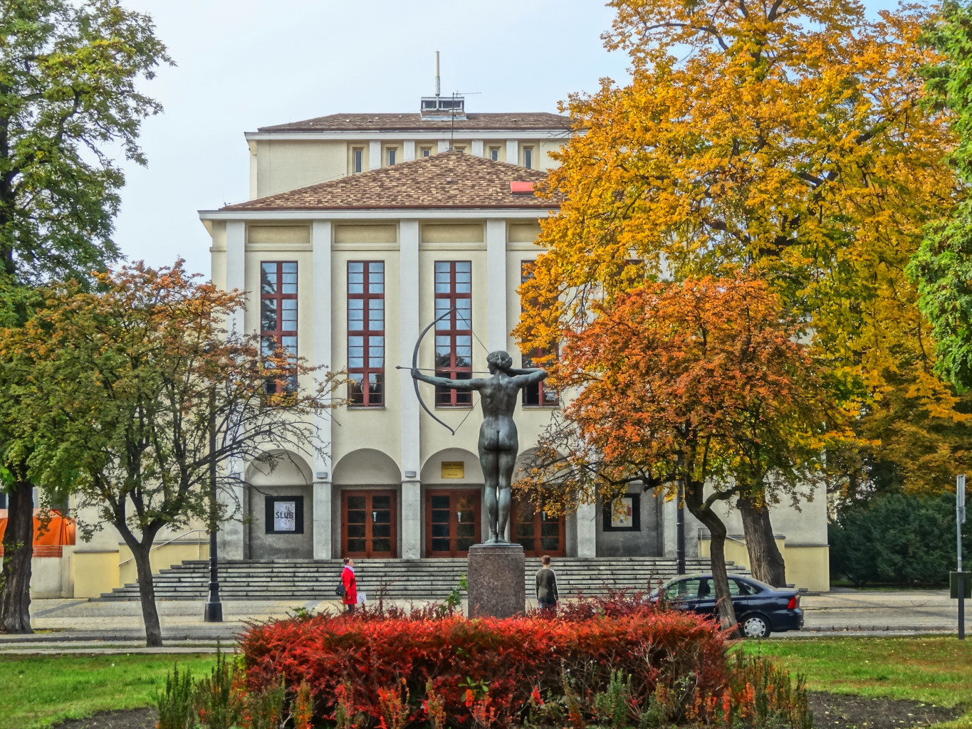 Rzeźba Łuczniczki autorstwa prof. Ferdinanda Lepcke odsłonięta w 1910 r. w Bydgoszczy